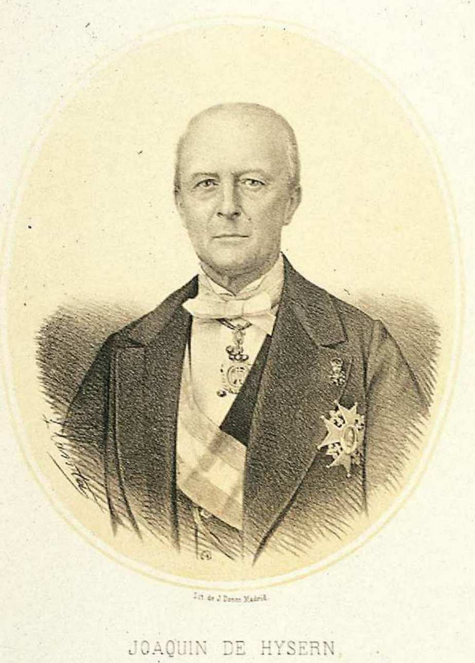 Joaquín Hysern y Molleras, litografía de Santiago Llanta y Guerín